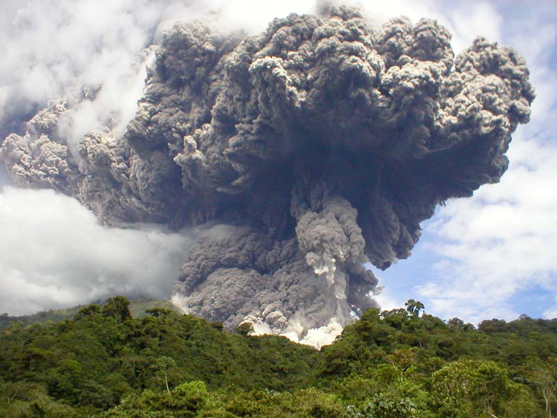 Volcán Reventador en erupción